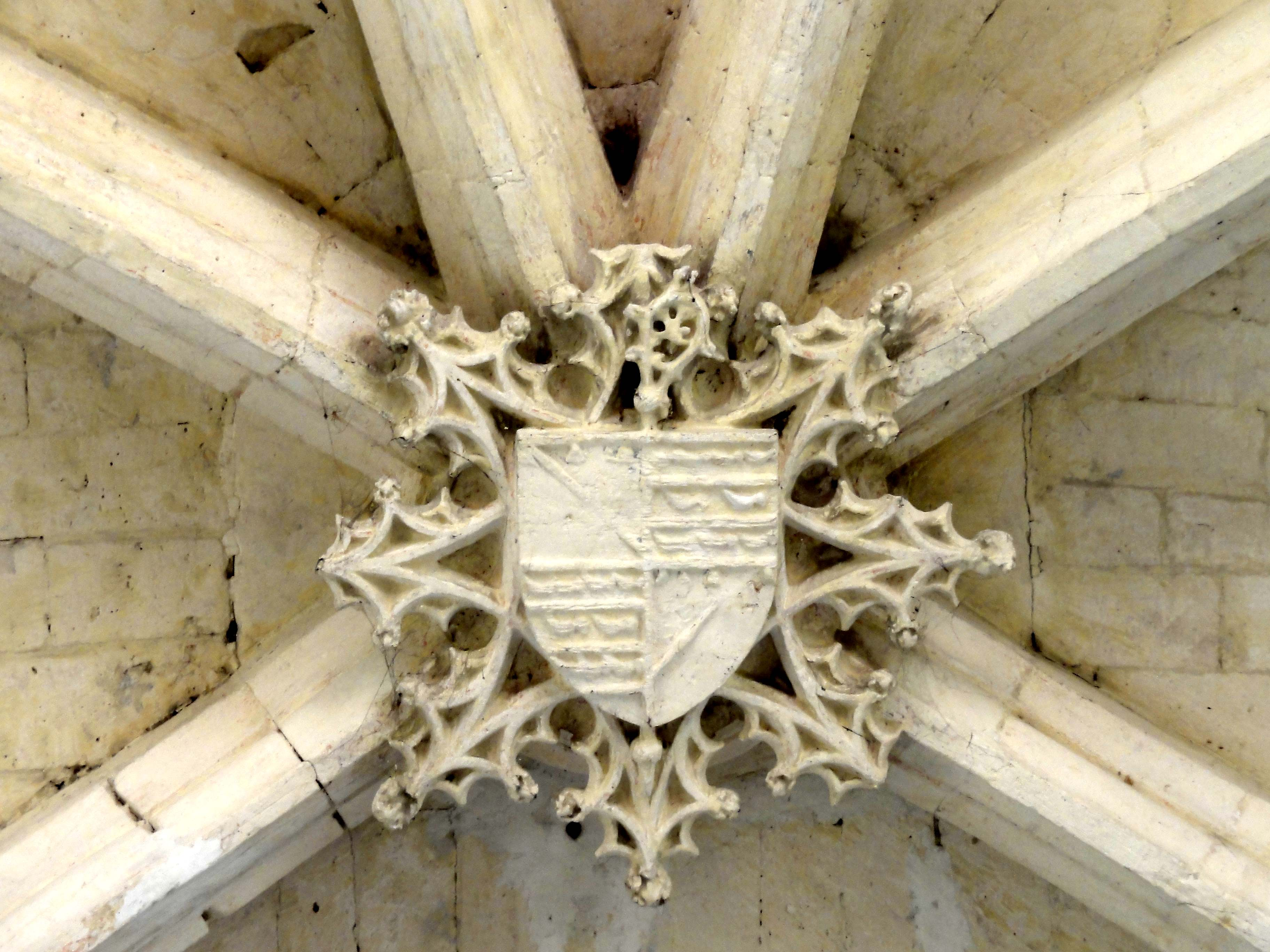 Clé de voûte de l'église (voir titre).